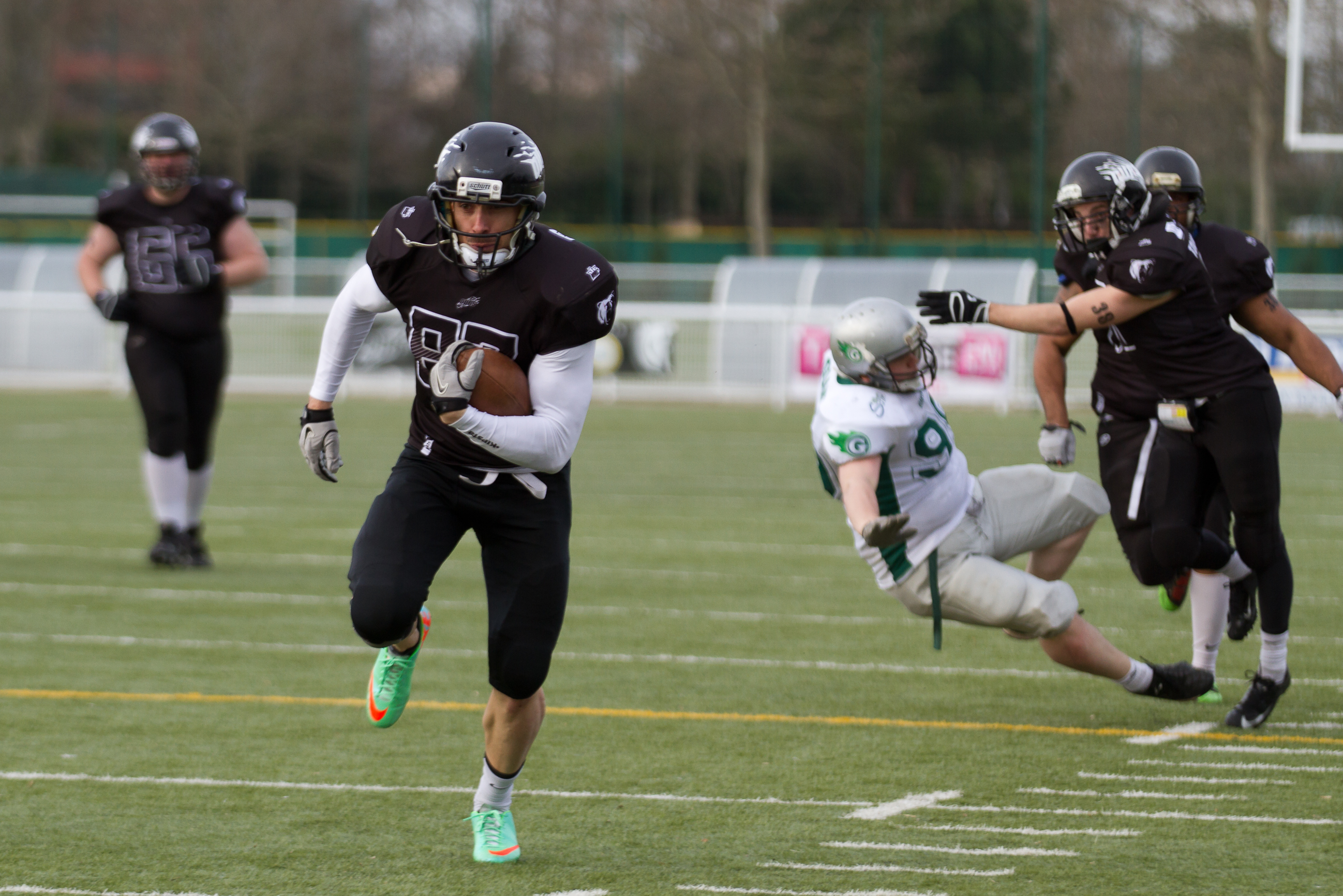 D2 — 16 February 2014, stade des Argoulets. Match between: Ours de Toulouse — Giants de Saint-Etienne